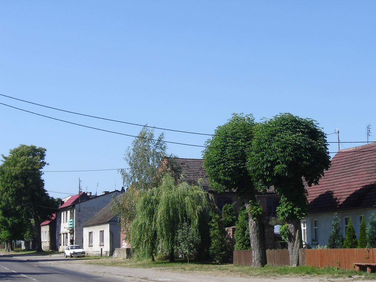 Wieś Piasecznik (powiat choszczeński).